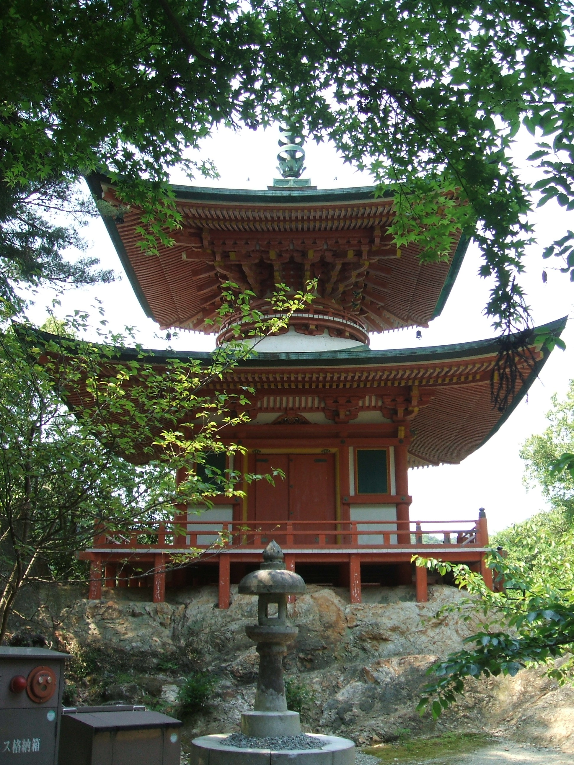 広島県三原市にある仏通寺の多宝塔（登録有形文化財）